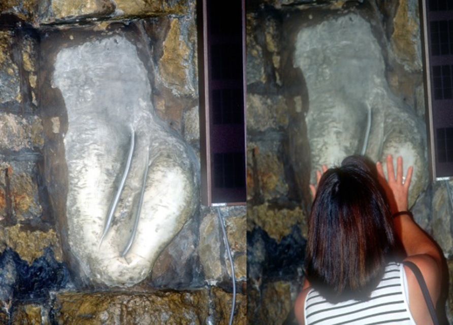 Dans l'église Notre-Dame-de-la-Mer, cippes consacrés aux Junons, dits oreillers des Saintes Maries